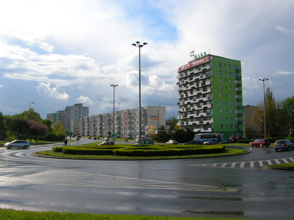 Piła - Rondo przy al. Piastów Autor - Bartek Wawraszko